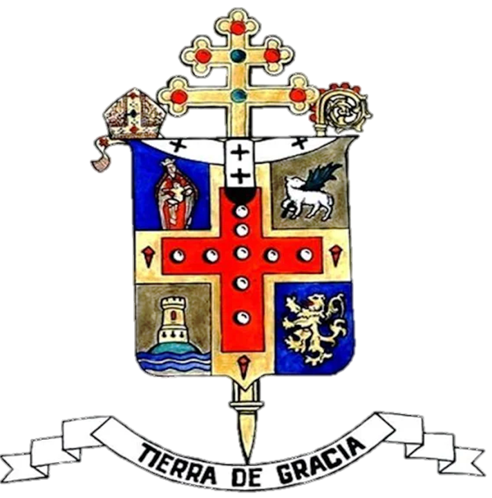 Escudo de la Iglesia Particular de Cumaná